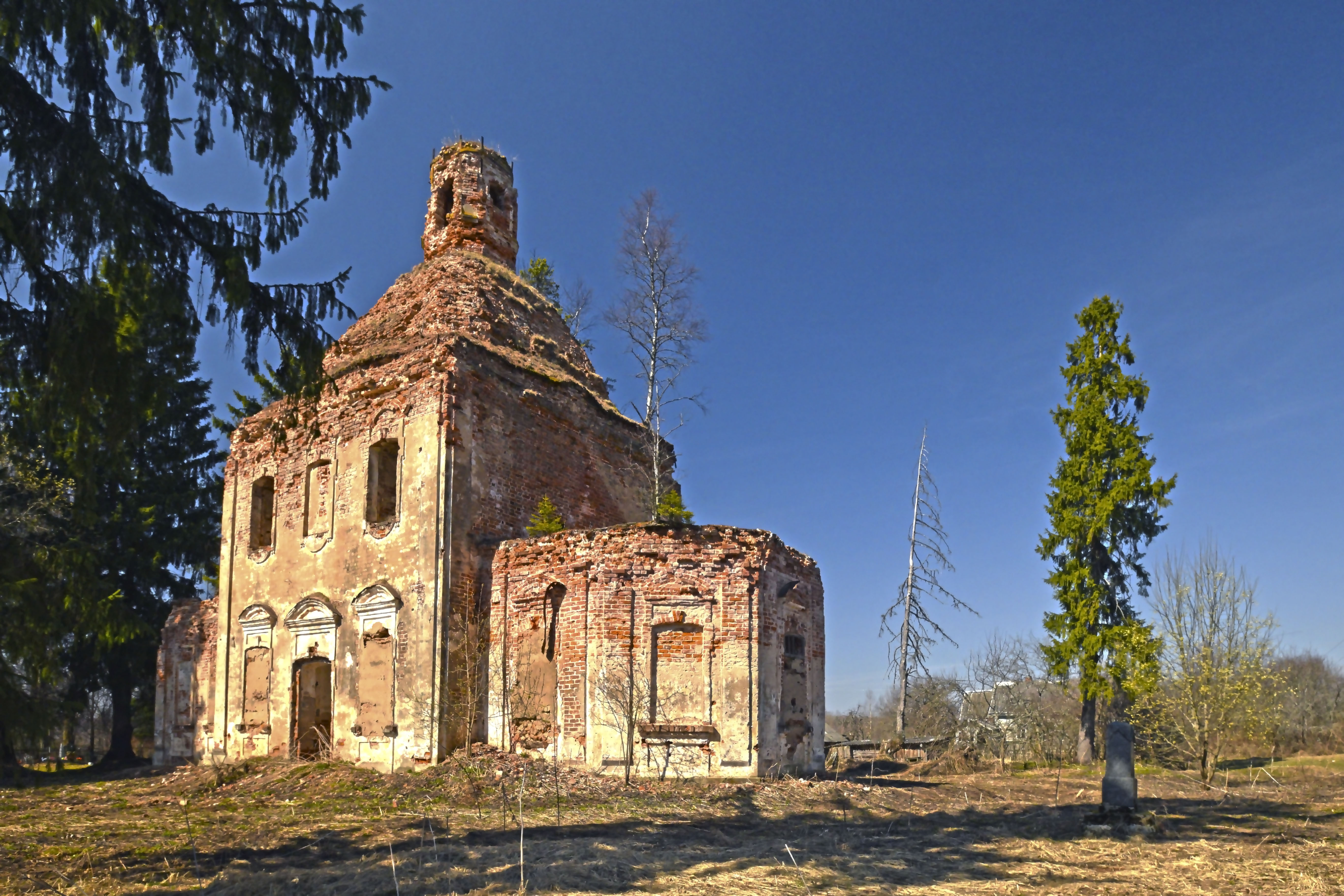 Церковь Успения: Загустинье, Духовщинский район, Смоленская область